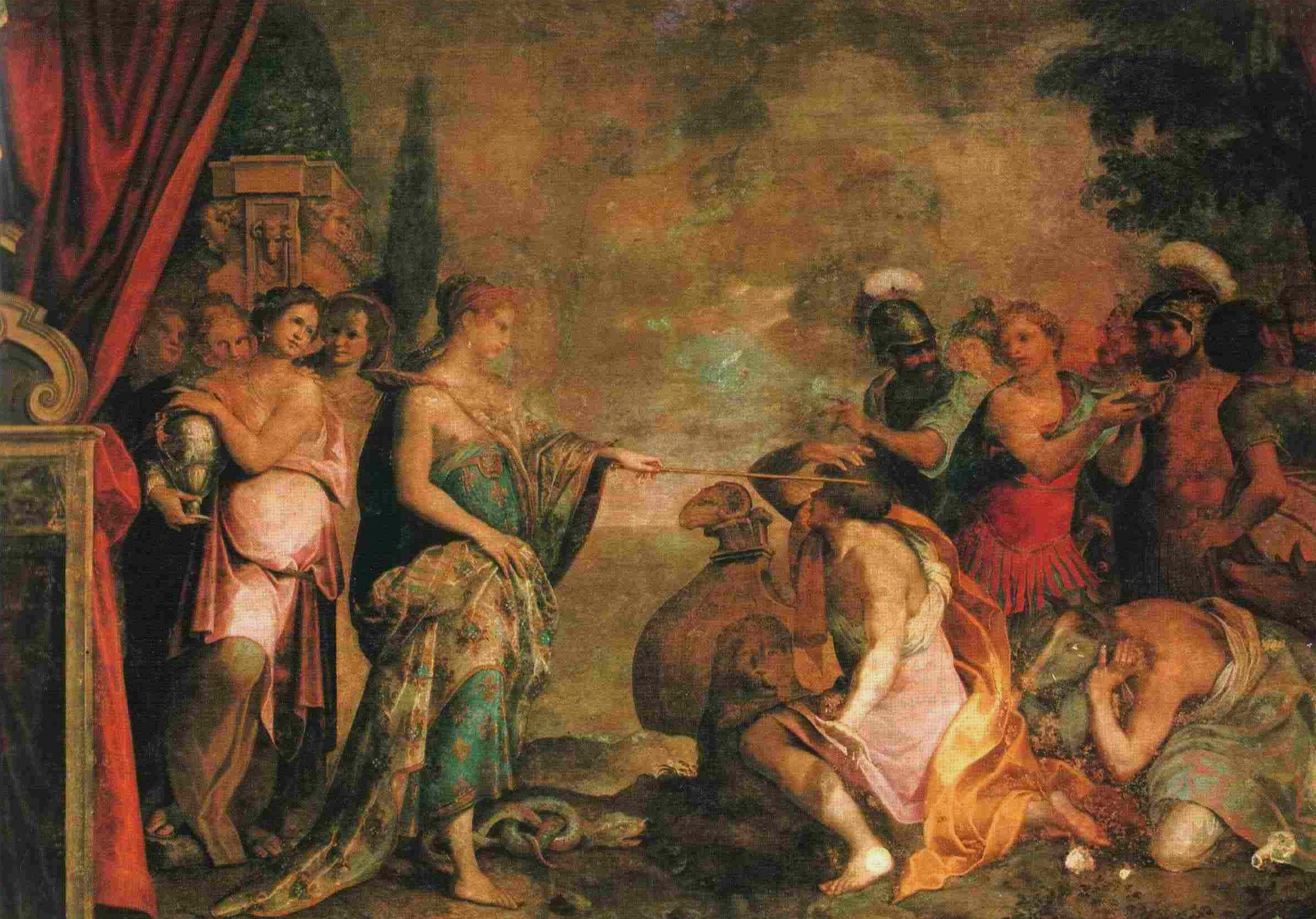 Circe restituisce la forma umana ai compagni di Ulisse.